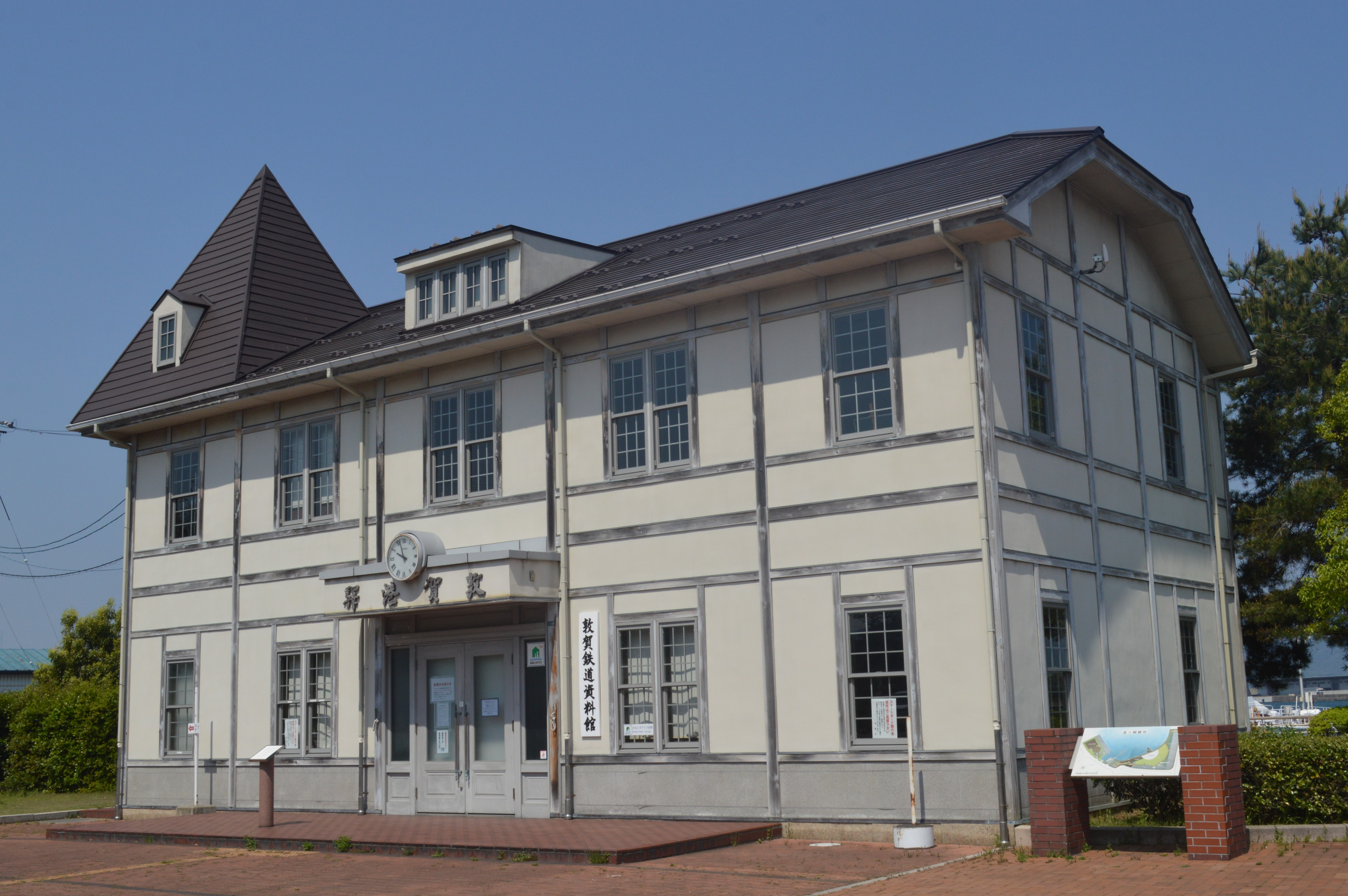 福井県敦賀市港町1-25にある敦賀鉄道資料館（旧敦賀港駅舎）。